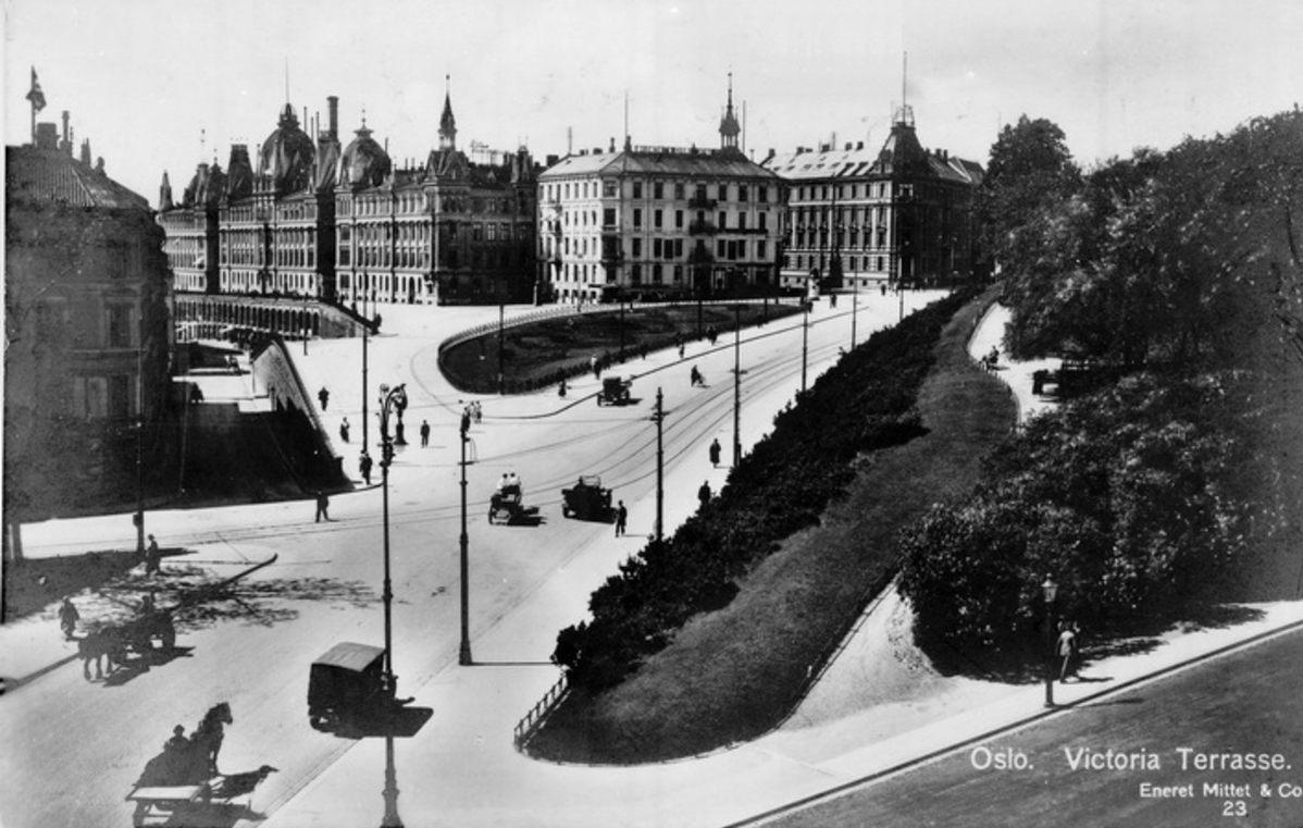 Victoria terrasse sett fra Drammensveien (nå Henrik Ibsens gate). Mittet-kort fra Oslo byarkivs samling.